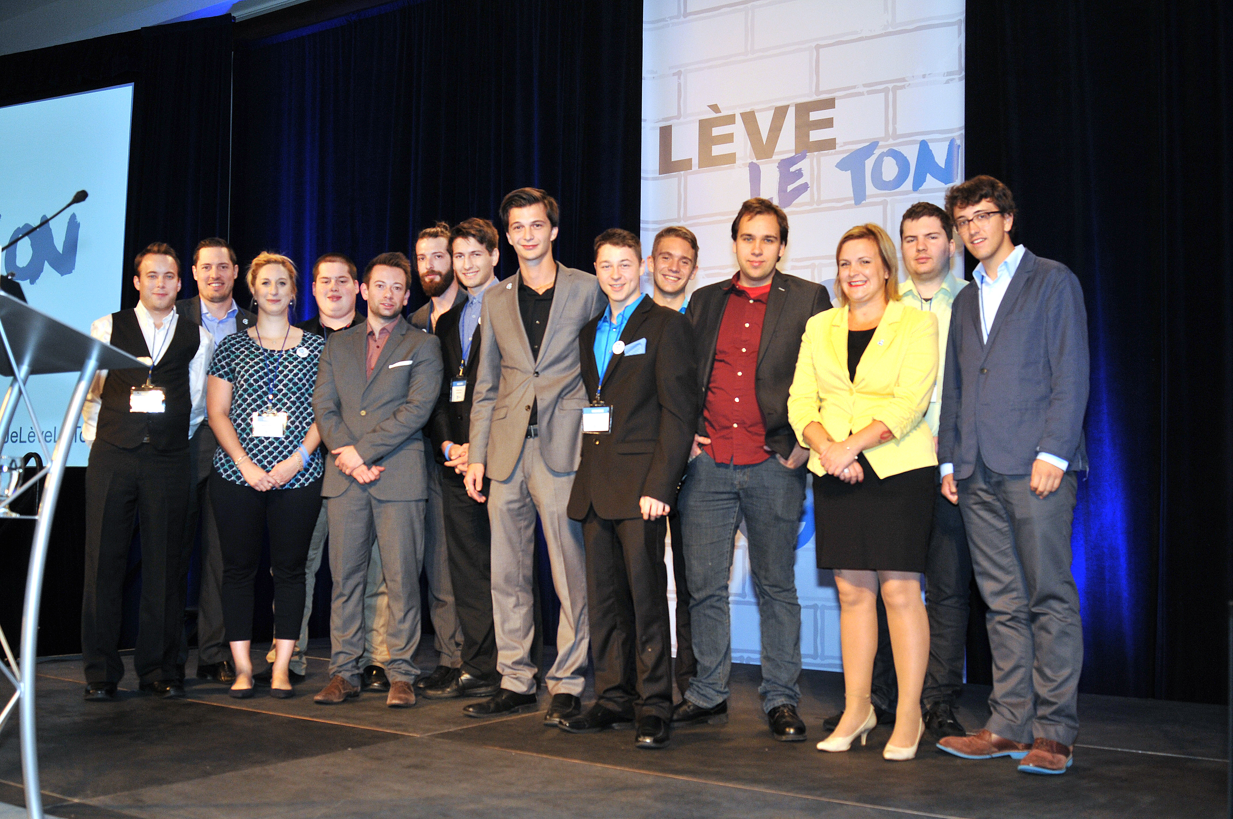 Le Conseil exécutif de la CRCAQ élu au Congrès des membres de la CRCAQ le 13 septembre 2015.